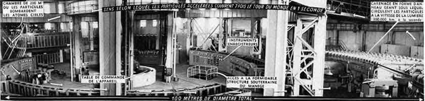 Centrale nucléaire russe pour France-Soir